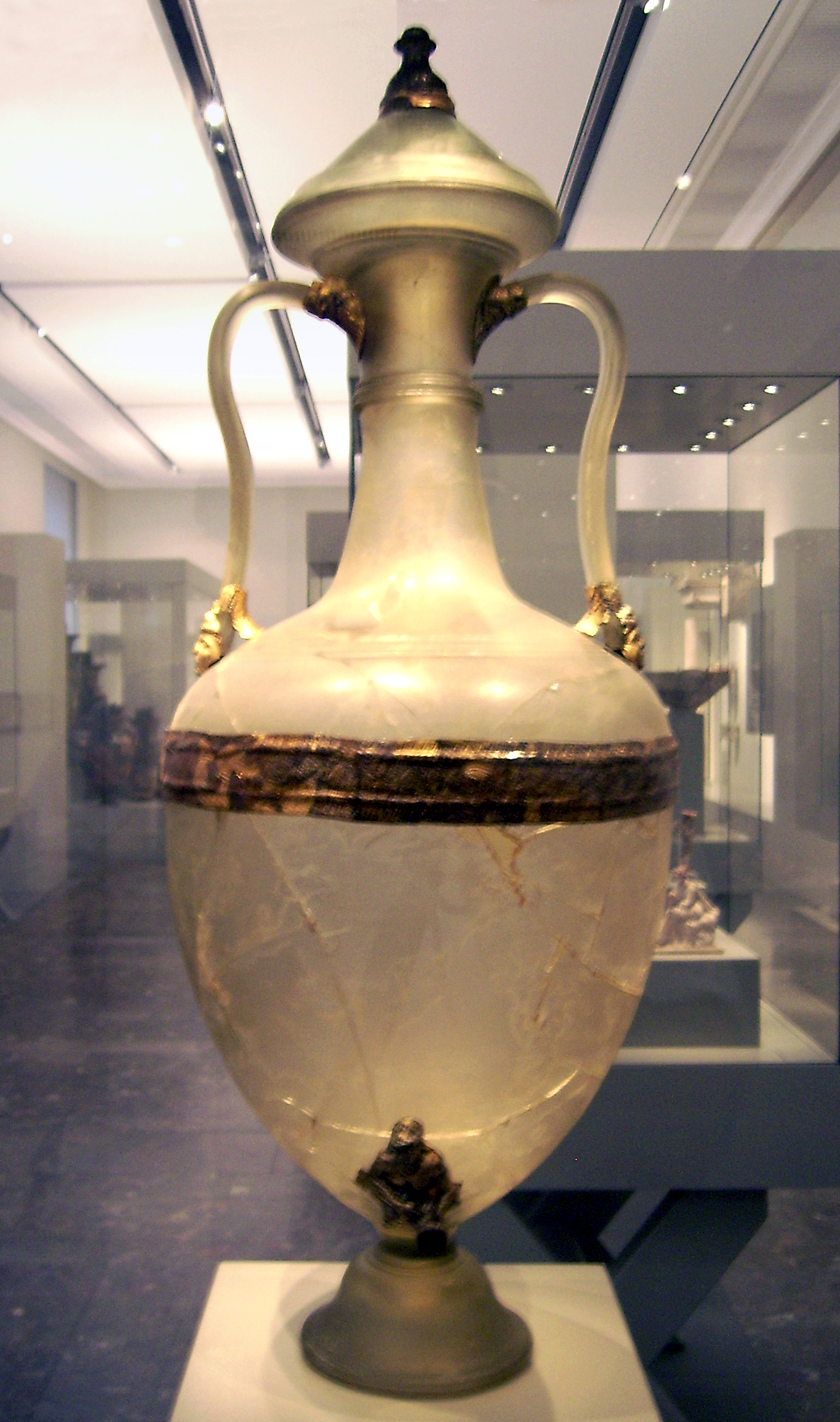 Hellenistische Glasamphora aus der 2. Hälfte des 2. Jahrhunderts v. Chr.; gefunden in Olbia; Antikensammlung Berlin/Altes Museum - seit 1913 - Inventarnummer 30219,254